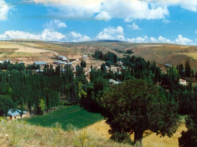 Köyün genel görünümü